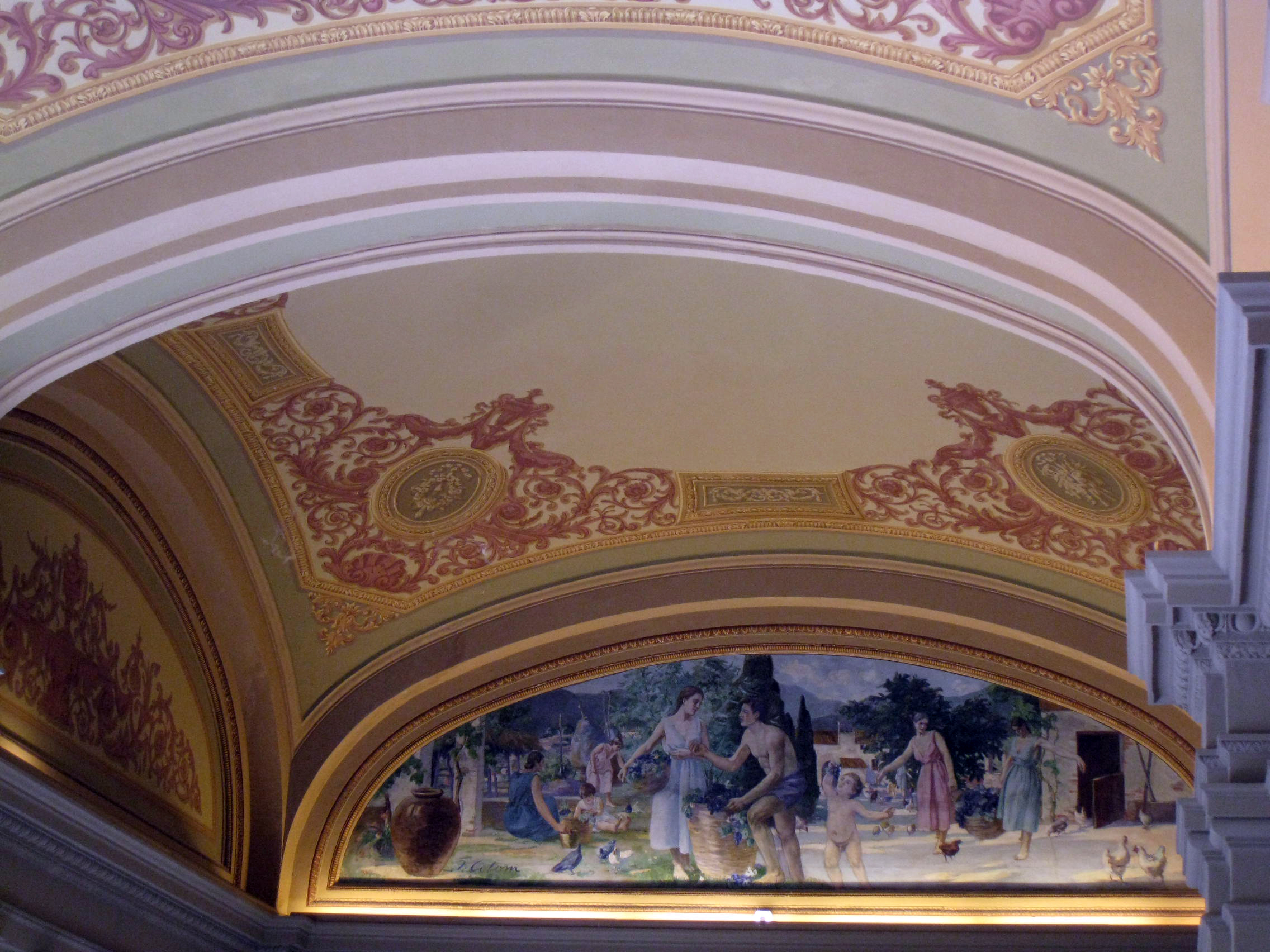 Palau Nacional (Barcelona)